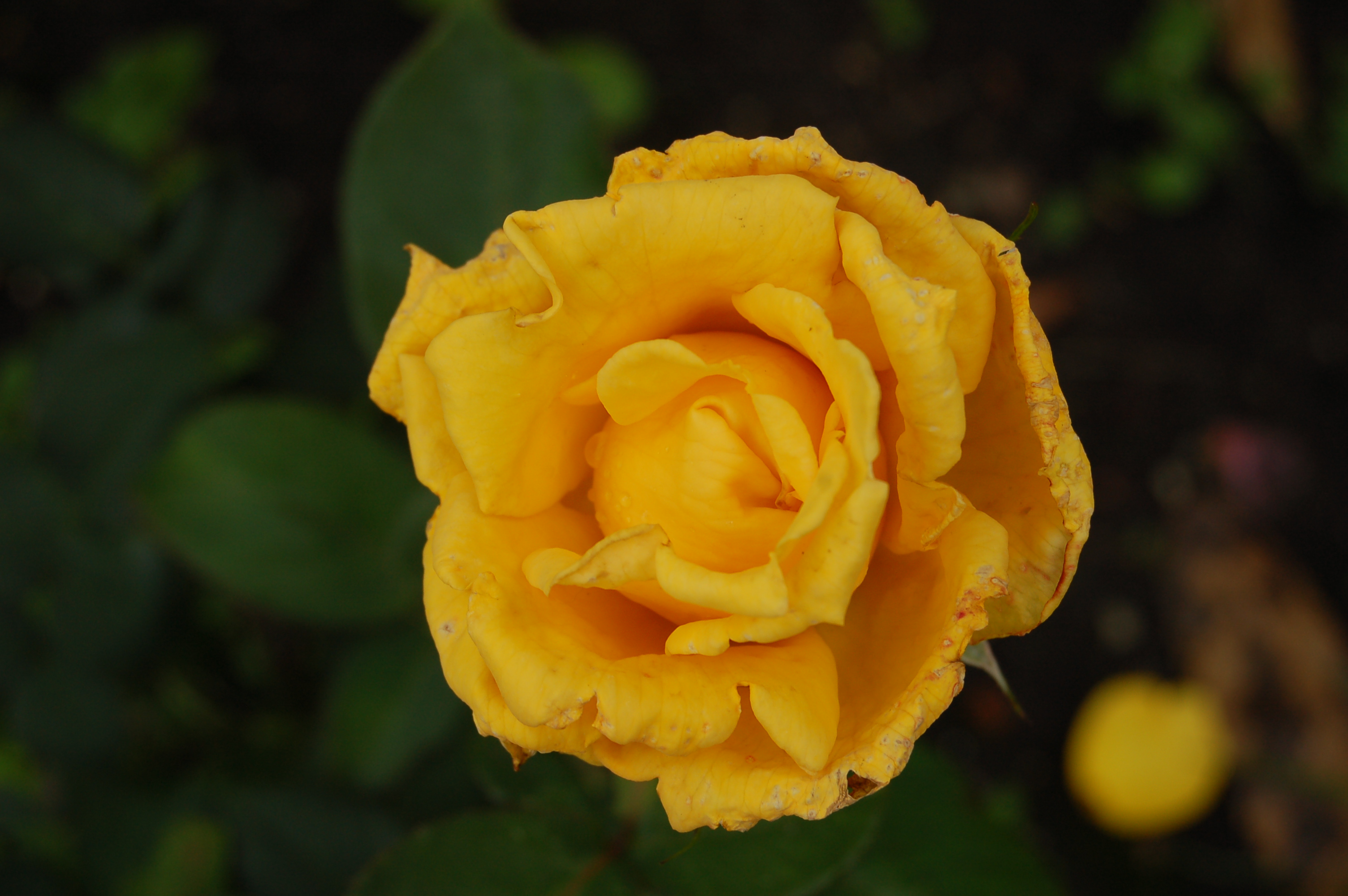 Rosa 'Helmut Schmidt'